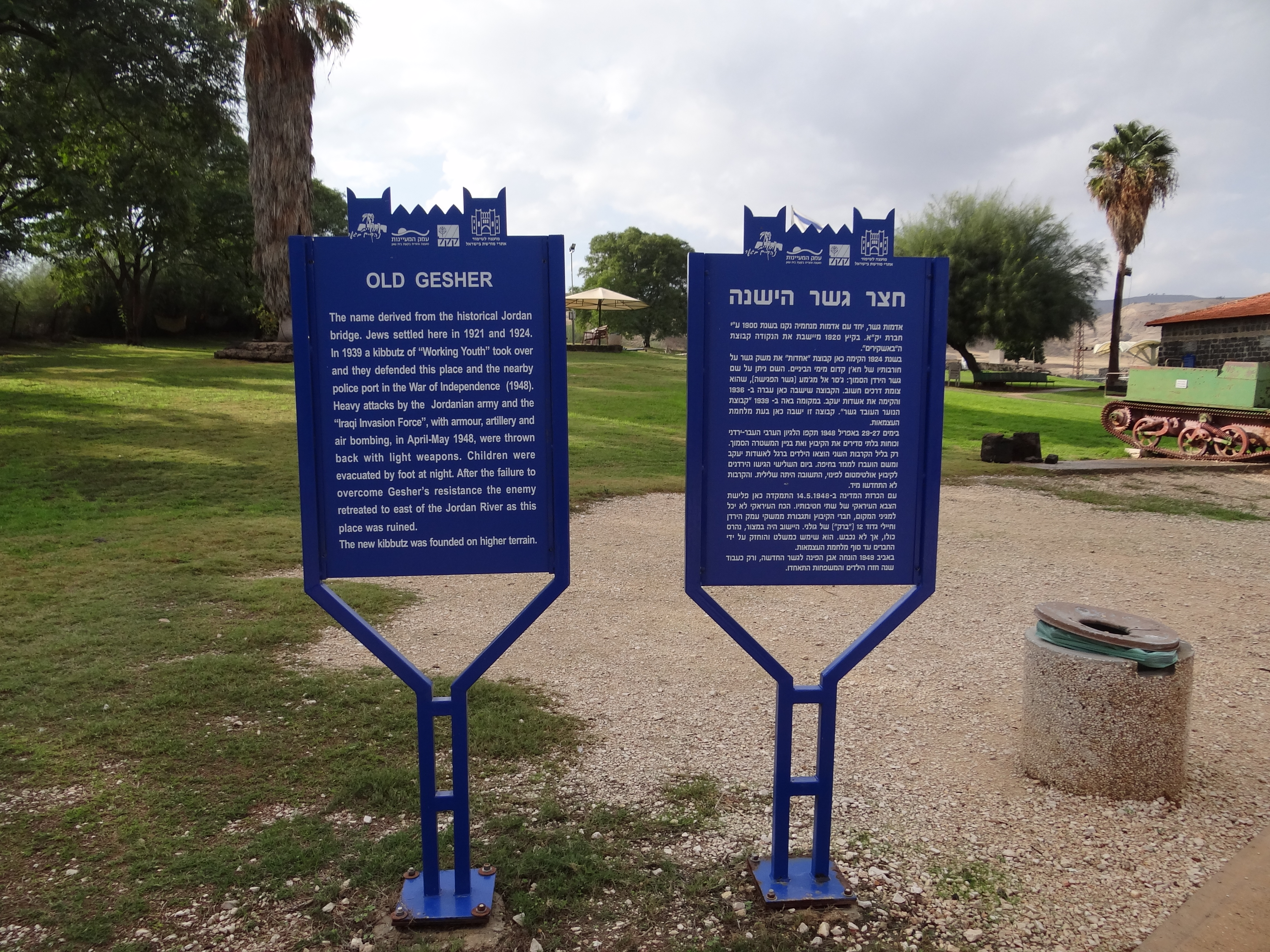 Old Gesher. In 1939 a kibbutz settle in the area. It called Gesher. The member of the kibbutz defended this palce and the police station in 1948 חצר גשר הישנה. במקום הייתה התיישבות בשנות העשרים של המאה העשרים. המתיישבים הקימו בשנת 1936 את קיבוץ אשדות יעקב. בשנת 1939 התיישבה קבוצה שהקימה את קיבות גשר. היא הגנה על המקום במלחמת העצמאות. היישוב הותקף על ידי בצבא העירקי נהרס אבל לא נכבש.